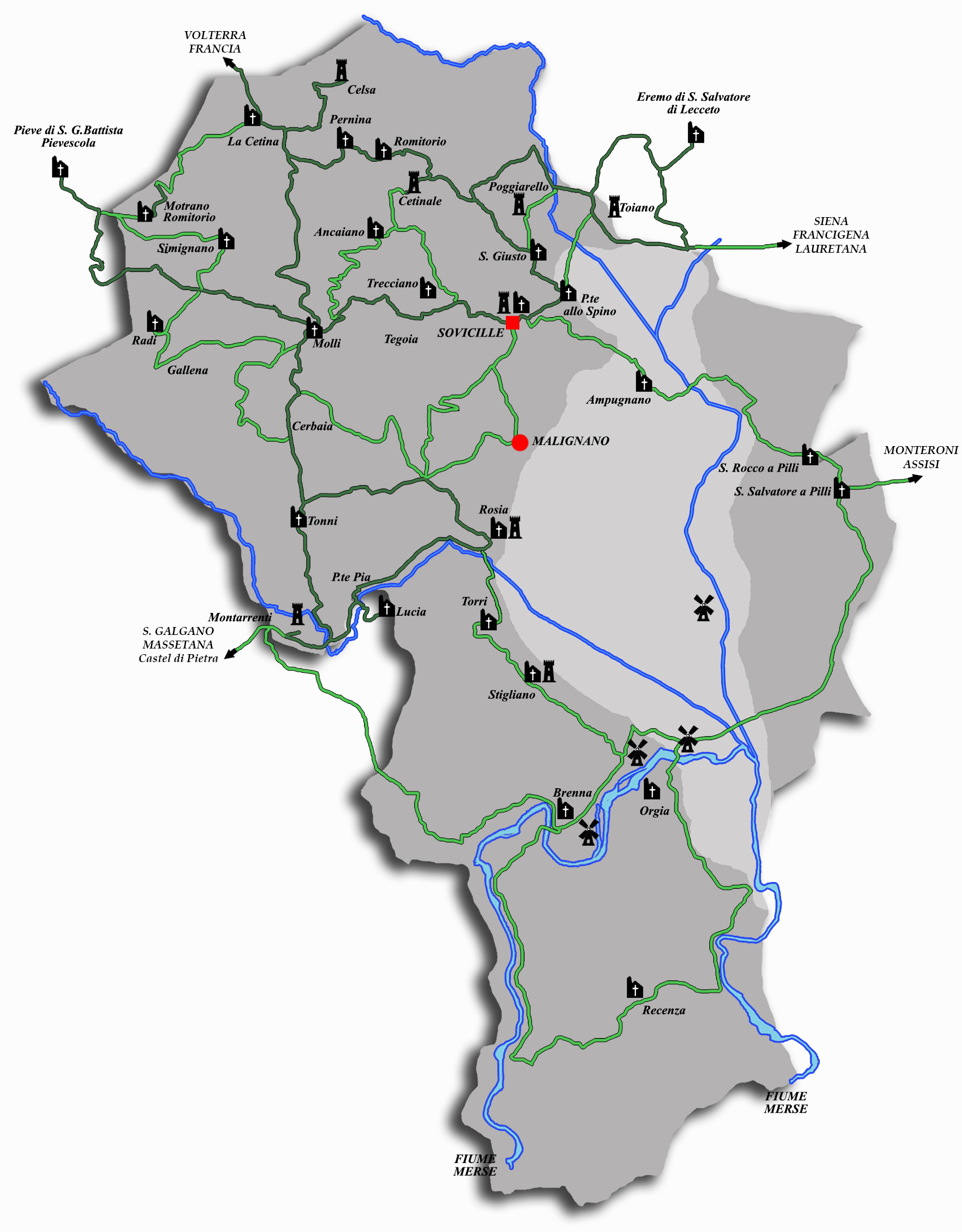 Planimetria dei percorsi e dei sentieri del Museo delle Pievi di Sovicille